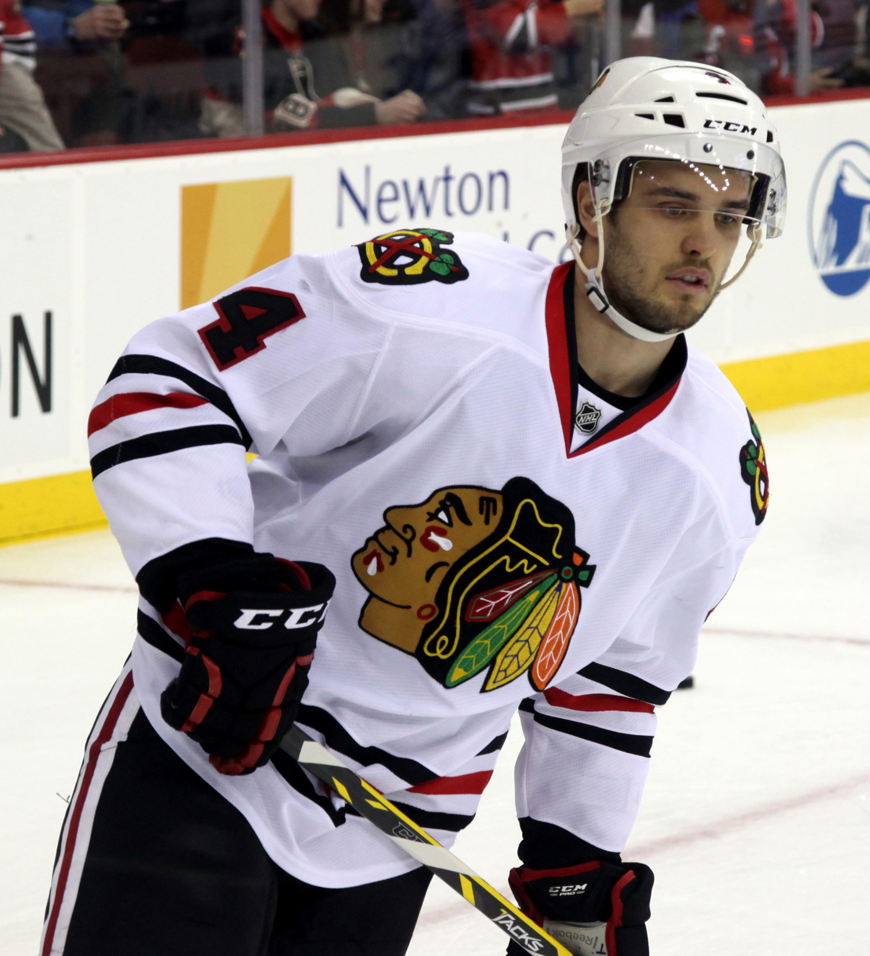 Niklas Hjalmarsson in December 2014.